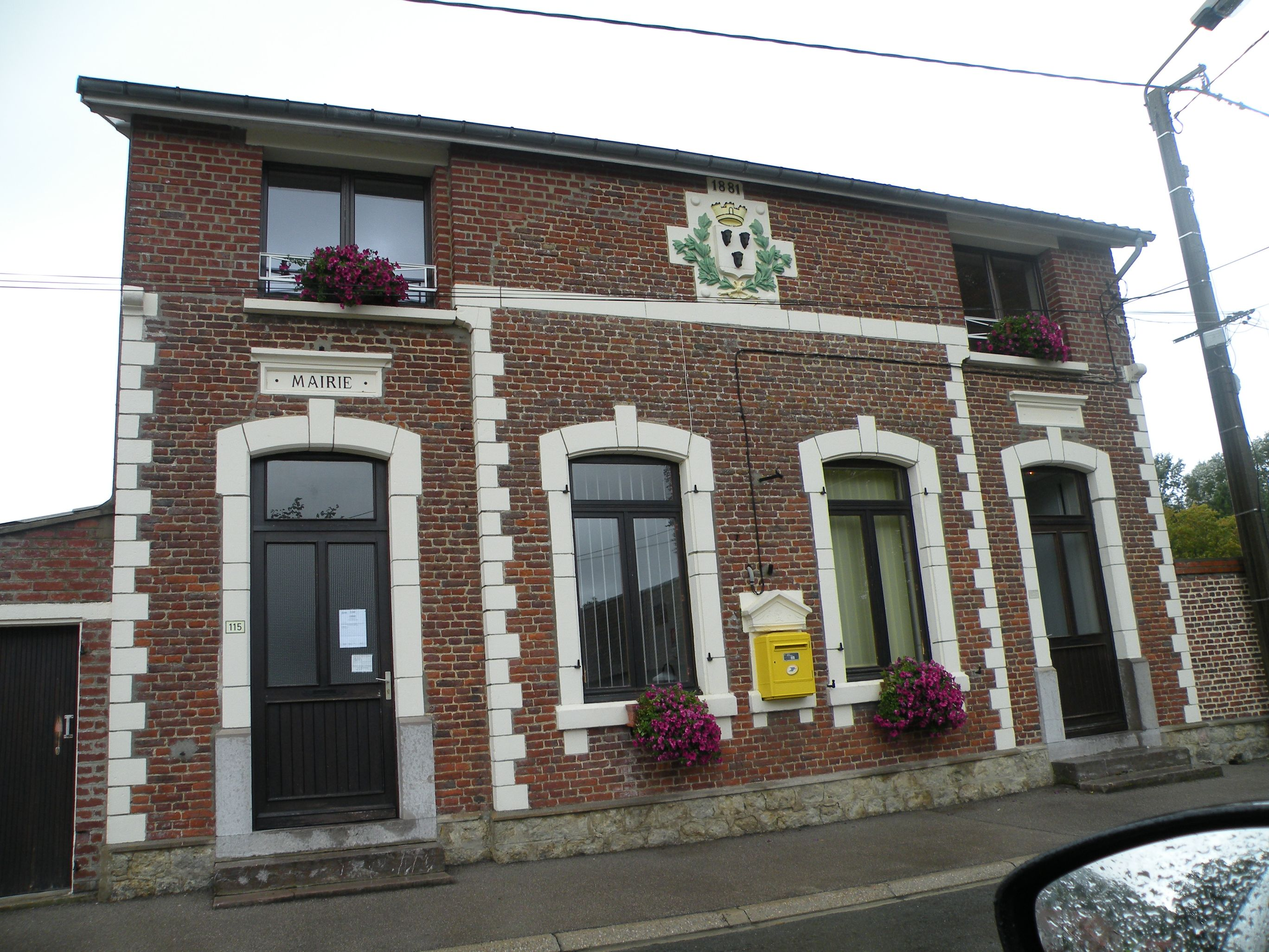 Mairie de Tingry